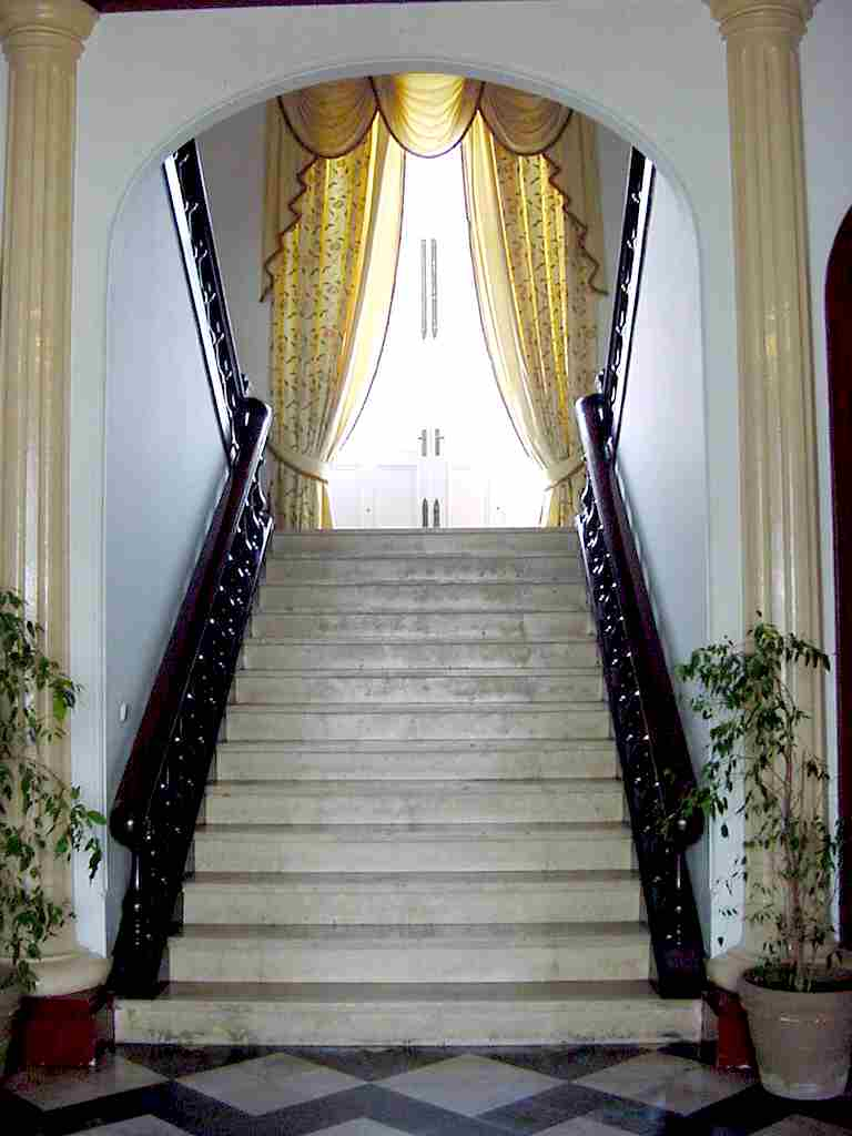 Antigo Paço Episcopal, mais tarde Junta Geral de Angra do Heroísmo, acesso ao 2º andar.